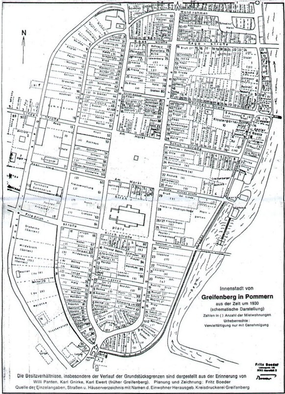 Mapa Starego Miasta Greifenberg/Pommern (Niemcy) - dziś Gryfice (Polska)